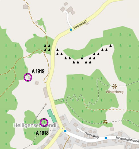 Sperrstelle Heiligenschwendi BE, Schweiz